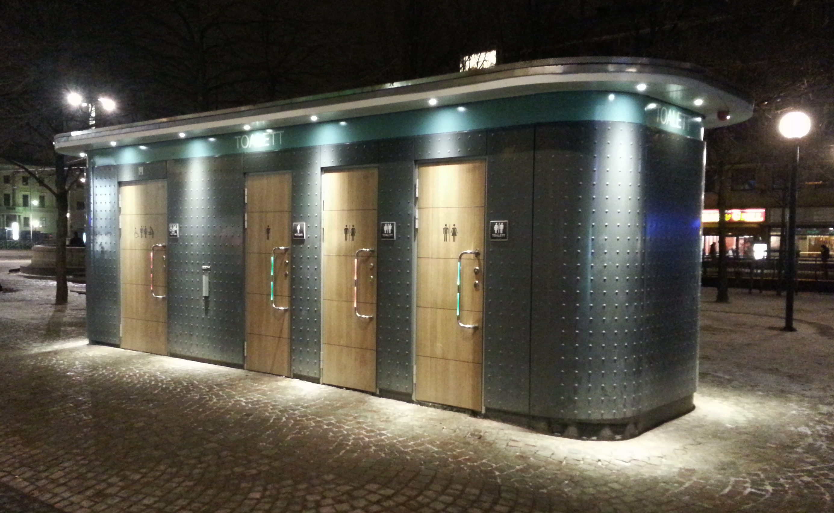 Offentlig toalett i Brunnsparken, Göteborg.